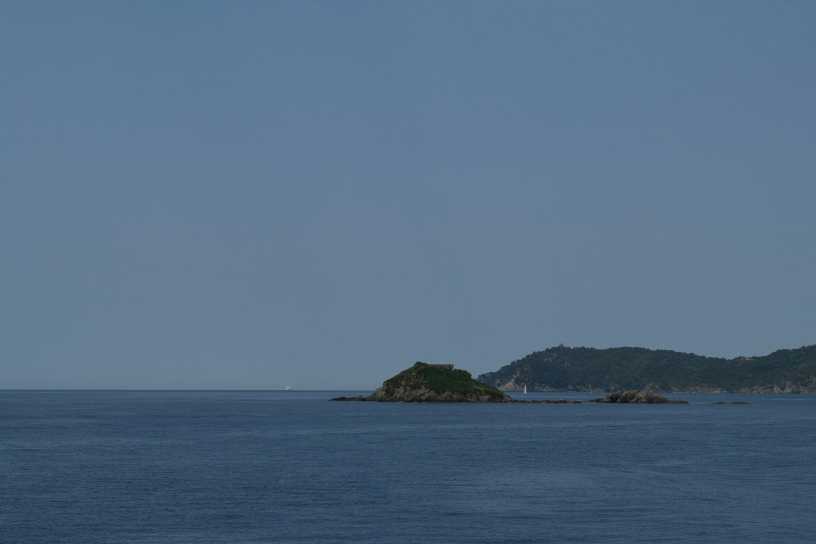 Ile du Petit-Ribaud